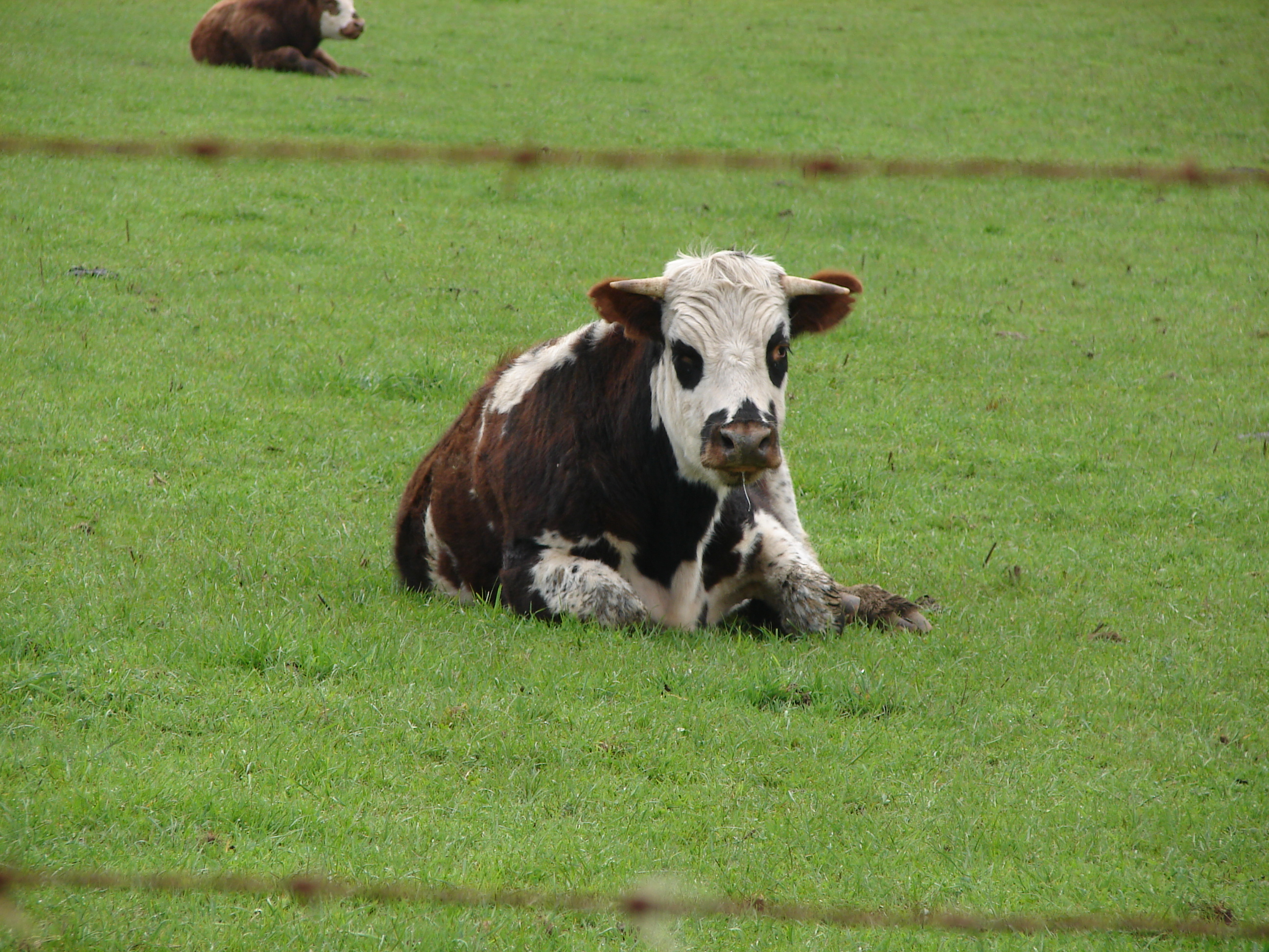 Ganadería en Purranque X Región Chile